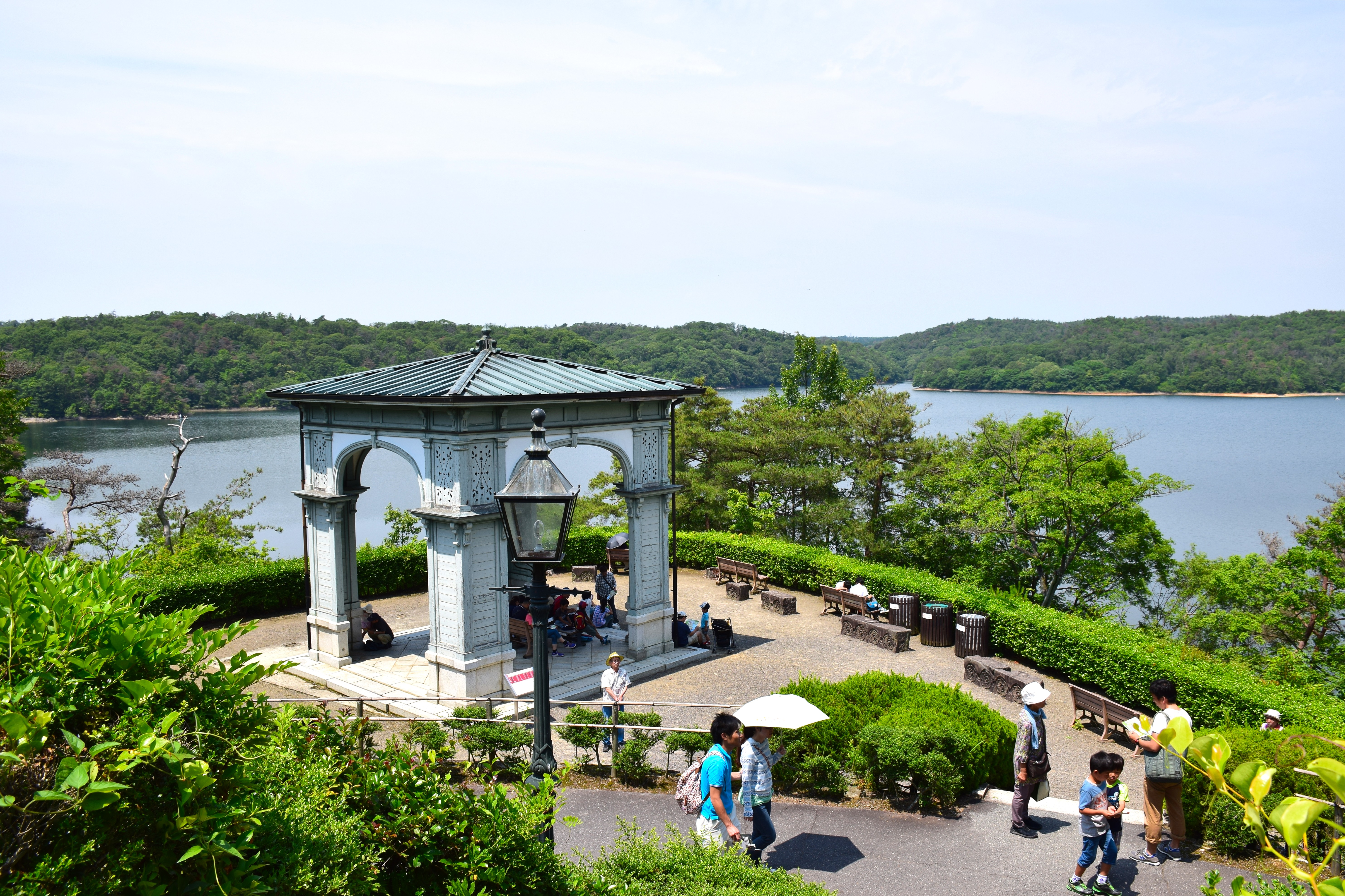 博物館明治村に移築保存されている宗教大学車寄。